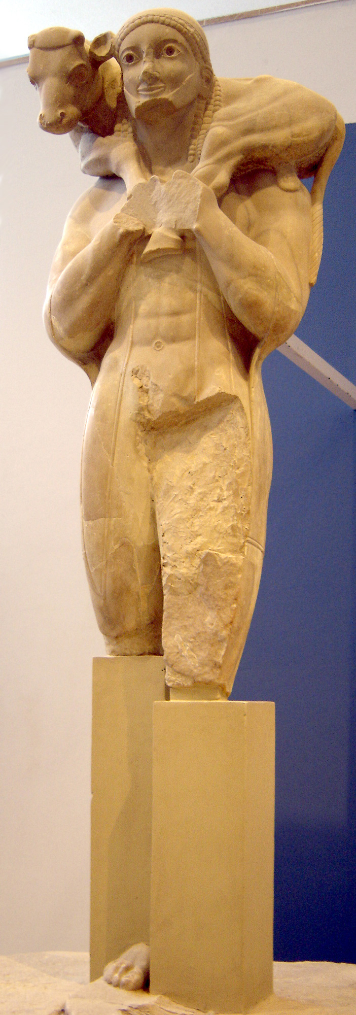 Statue d'un jeune homme barbu. Il est vêtu d'un himation court et il porte un veau sur ses épaules pour le sacrifier à la déesse. L'inscription fragmentaire sur la base conserve le nom du dédicant de cette statue votive : [Rh]ombos.